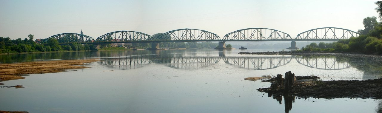 Most fordoński w Bydgoszczy